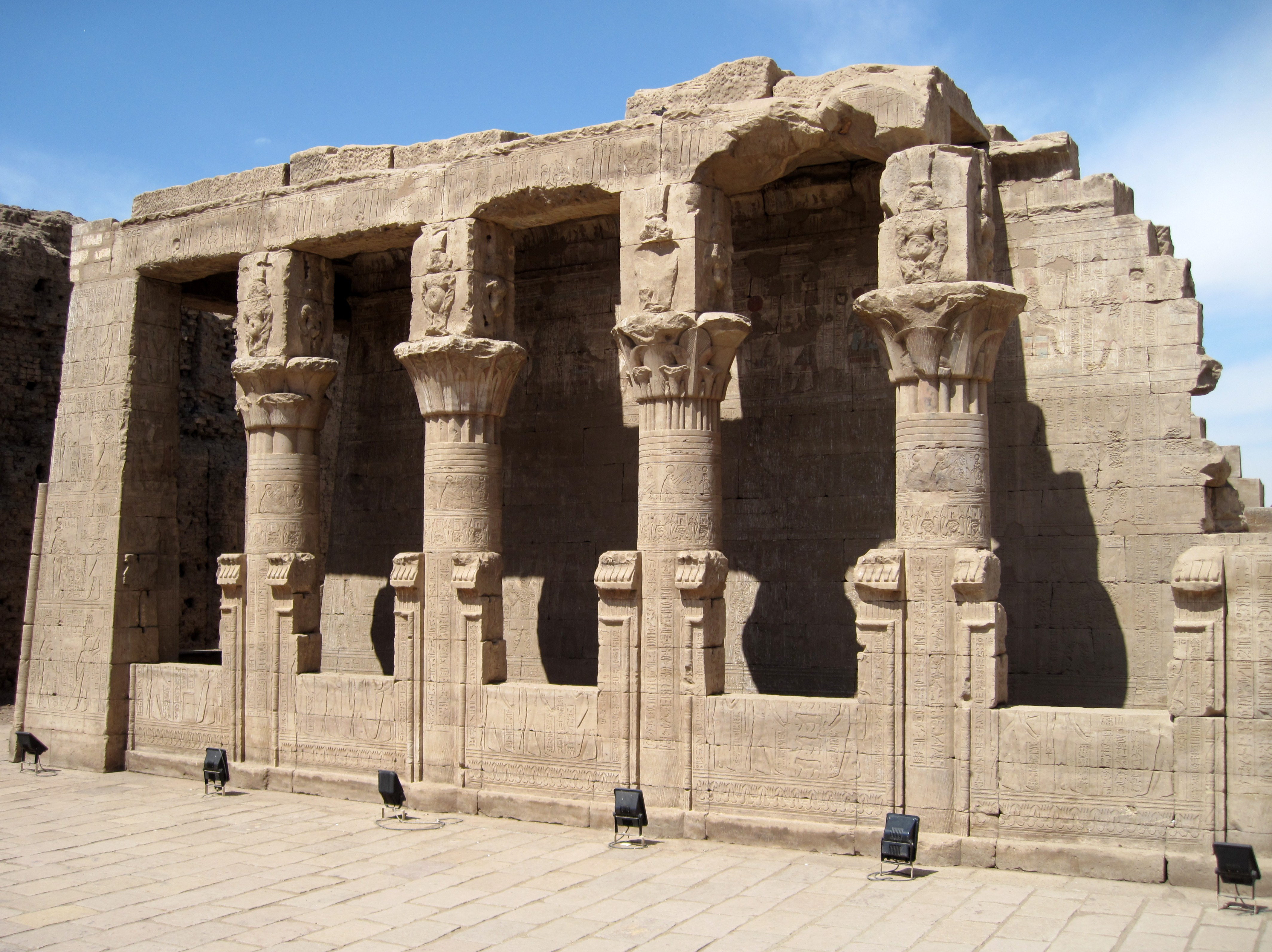 Südseite des Mammisi vor dem Tempel von Edfu, Ägypten